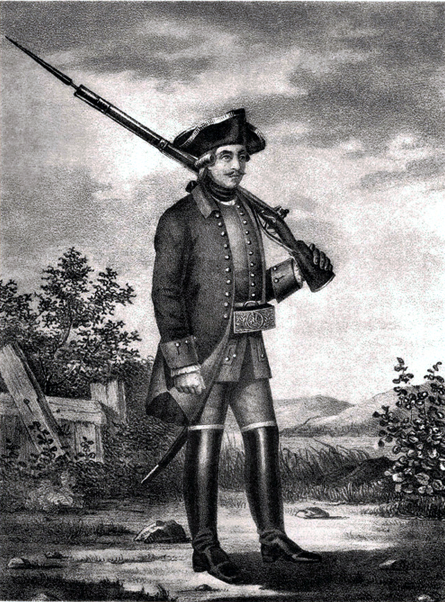 Мушкетёр Обсервационного корпуса с 1756 до 1762 года.